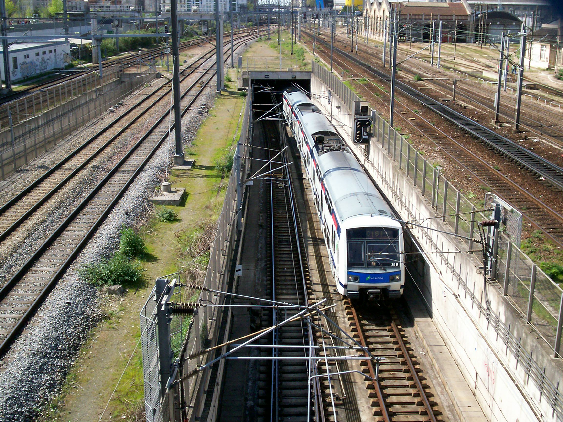 Vue depuis le pont de la rue Riquet d'un train CISI sortant du tunnel EOLE